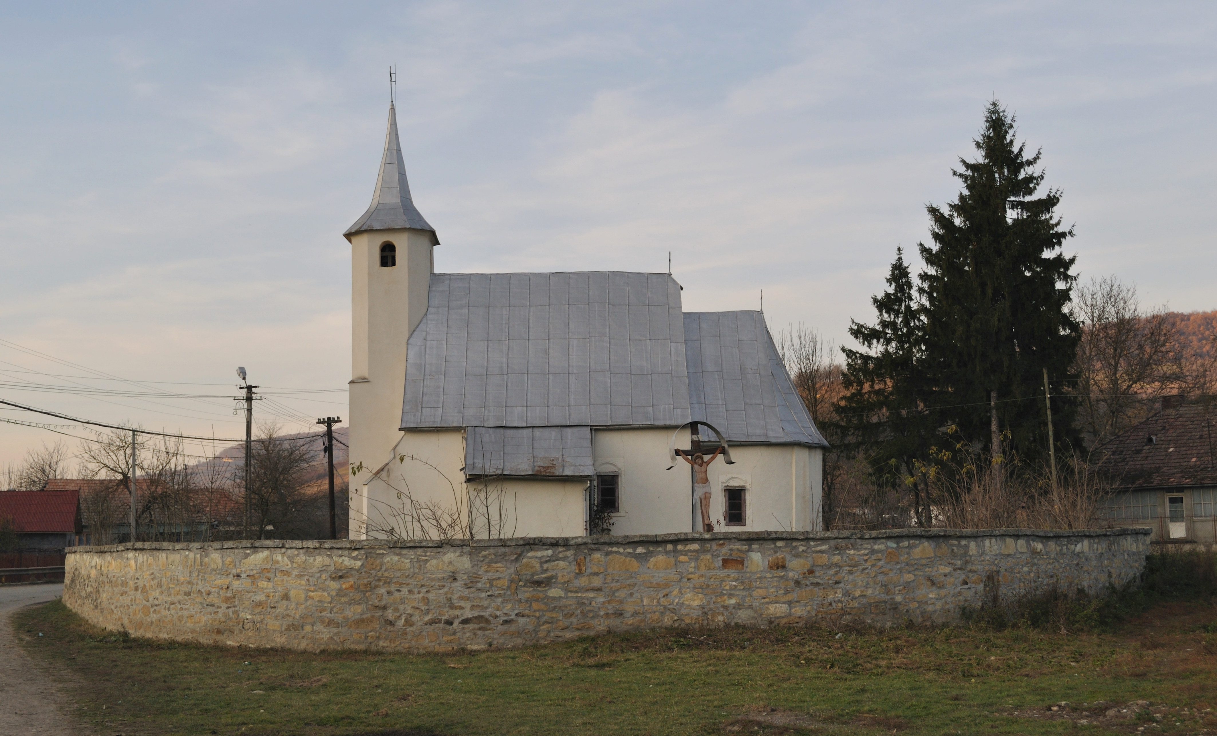 Cornești, județul Cluj